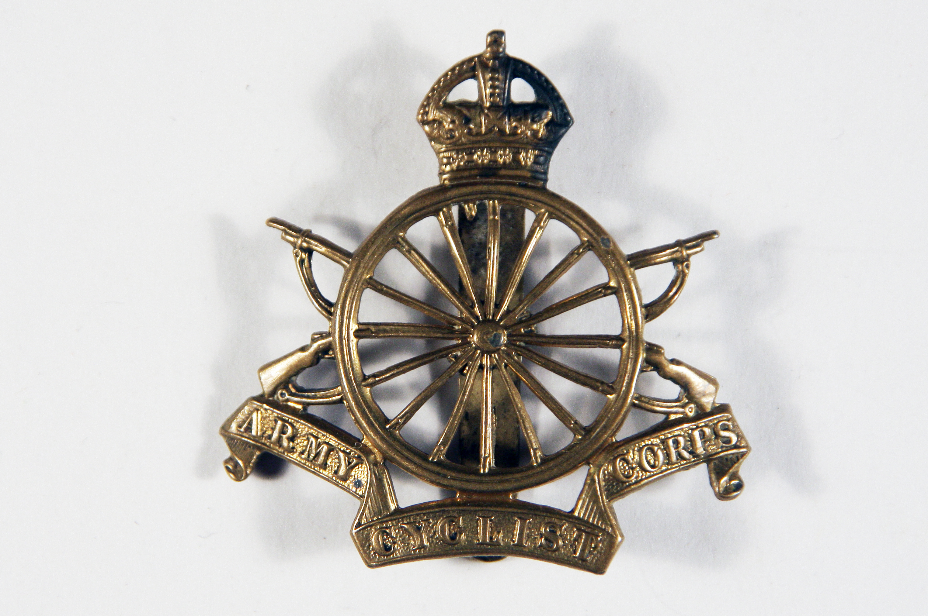 Beutestück